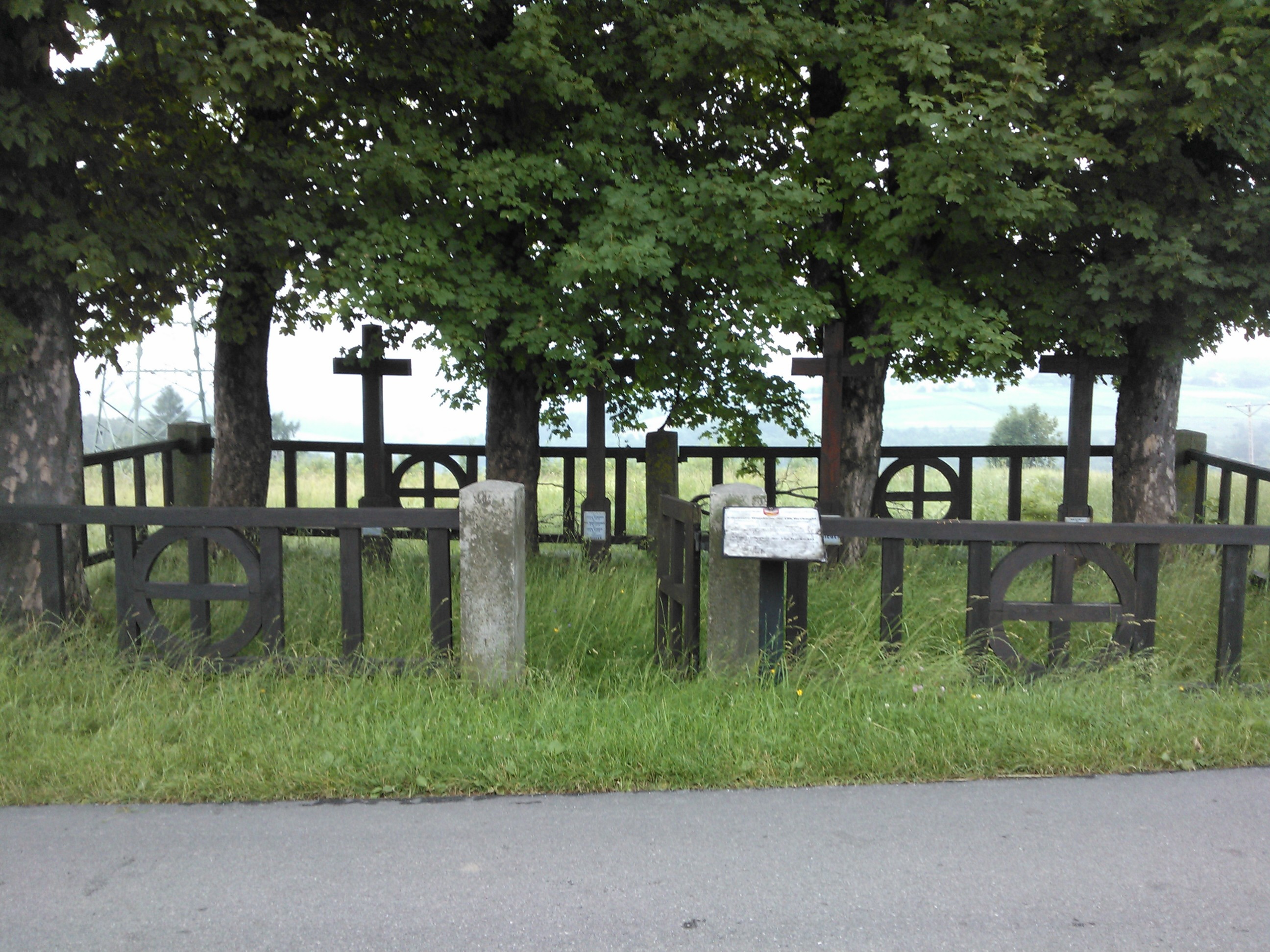 Cmentarz wojenny nr 188 - Rychwałd